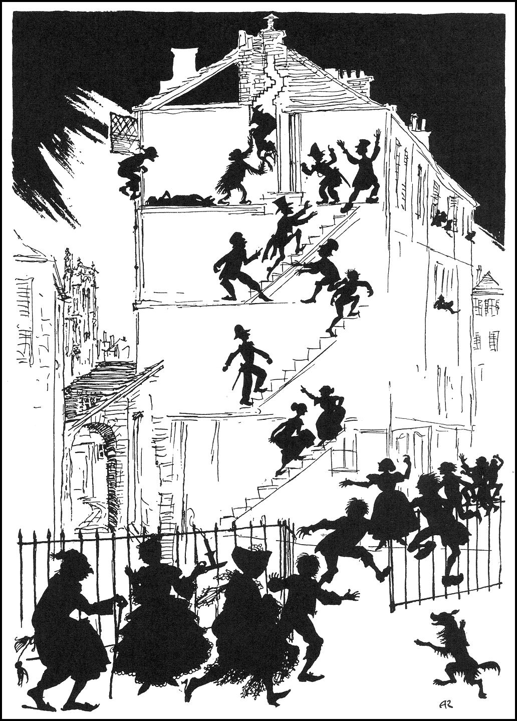 Иллюстрация Артура Рэкхема из книги "Poe's Tales of Mystery and Imagination" к рассказу Эдгара По "Убийства на улице Морг"